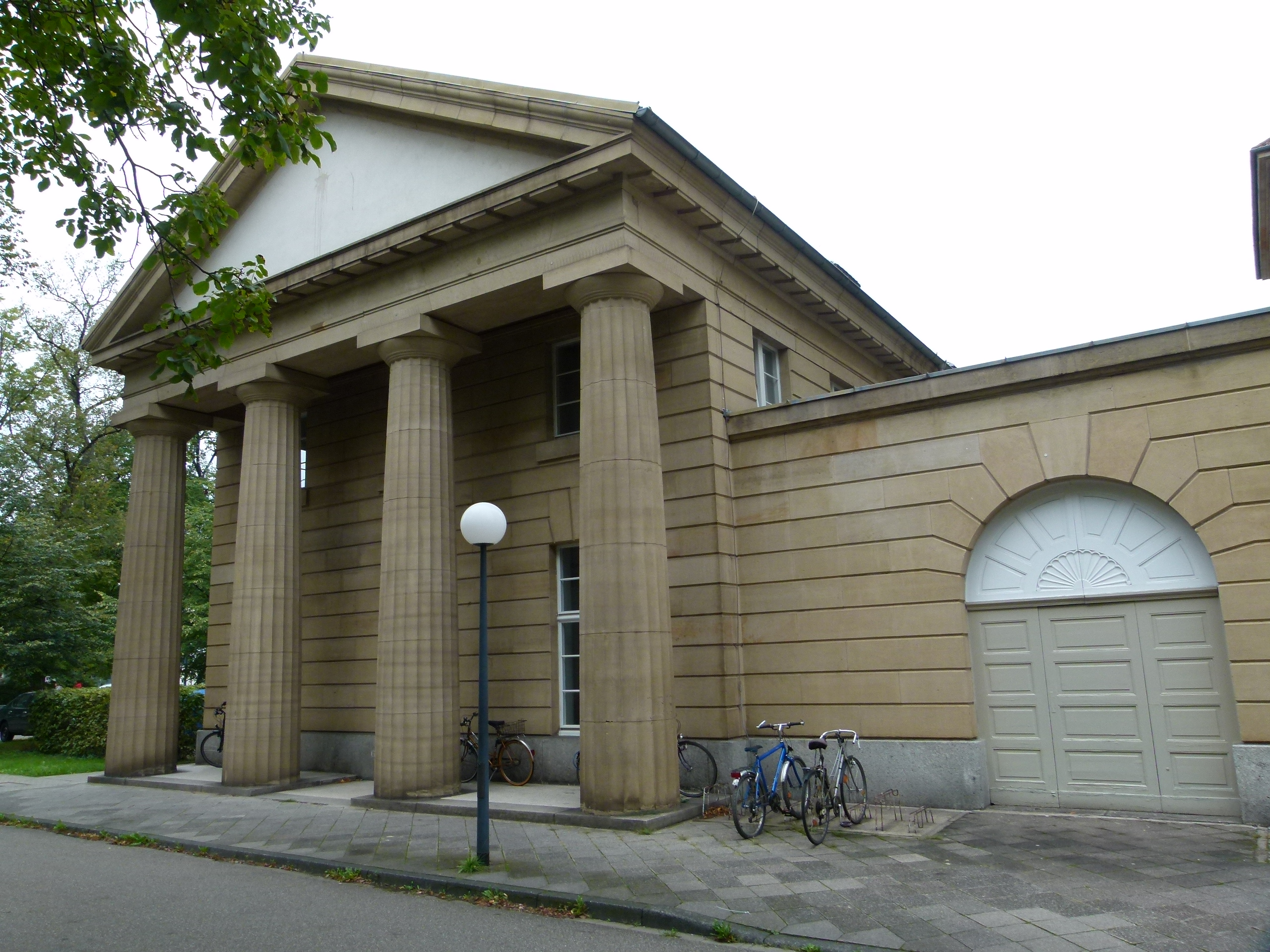 Denkmalgeschütztes Altes Bauingenieurgebäude, KIT, Otto-Ammann-Platz 1 Karlsruhe